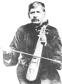 Ջիվանի (Սերոբ Ստեփանի Լևոնյան)